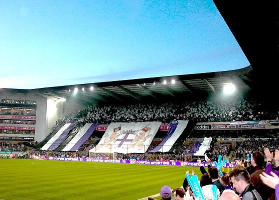 Constant Vanden Stockstadion, Anderlecht